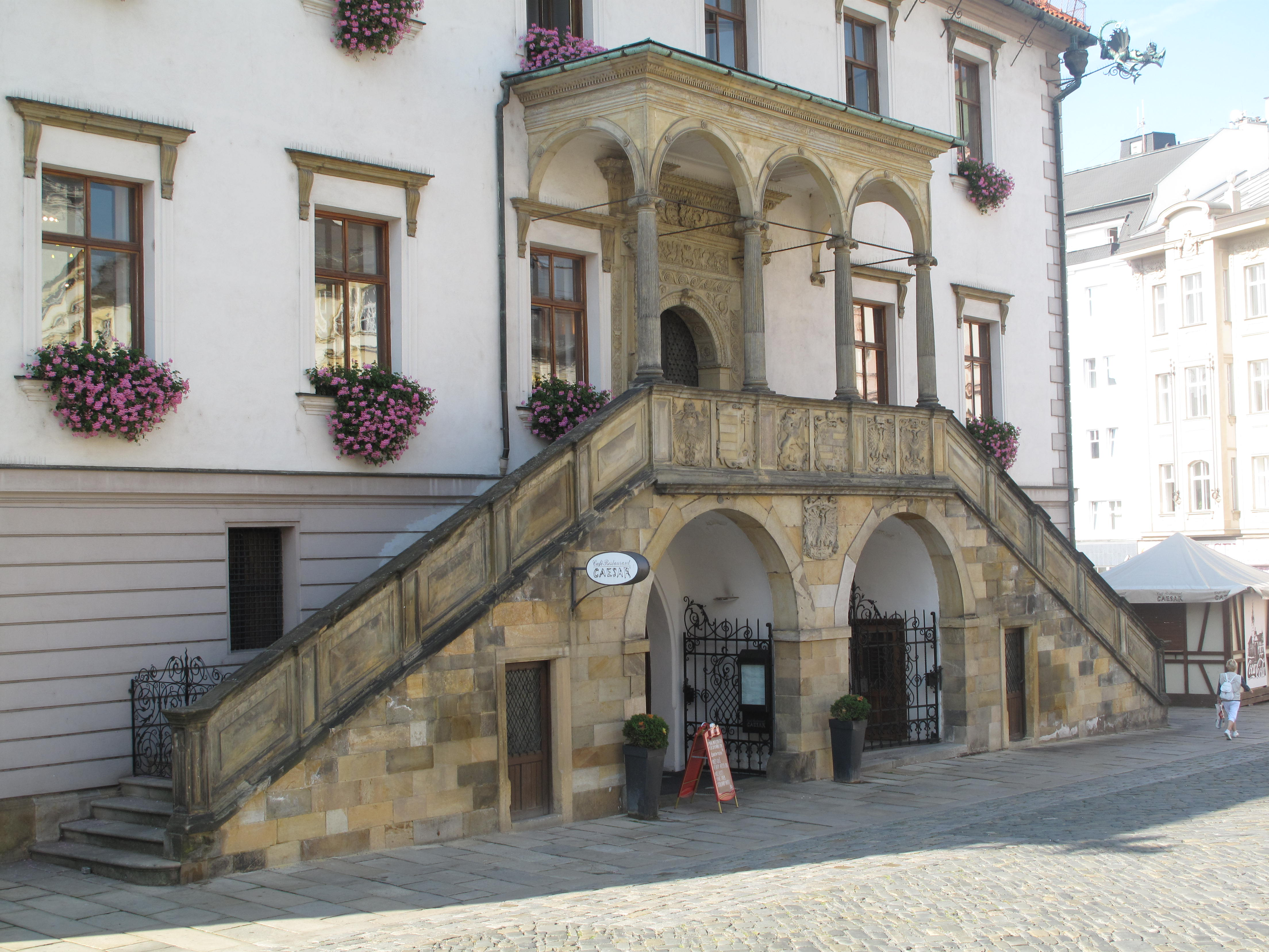 Olomouc